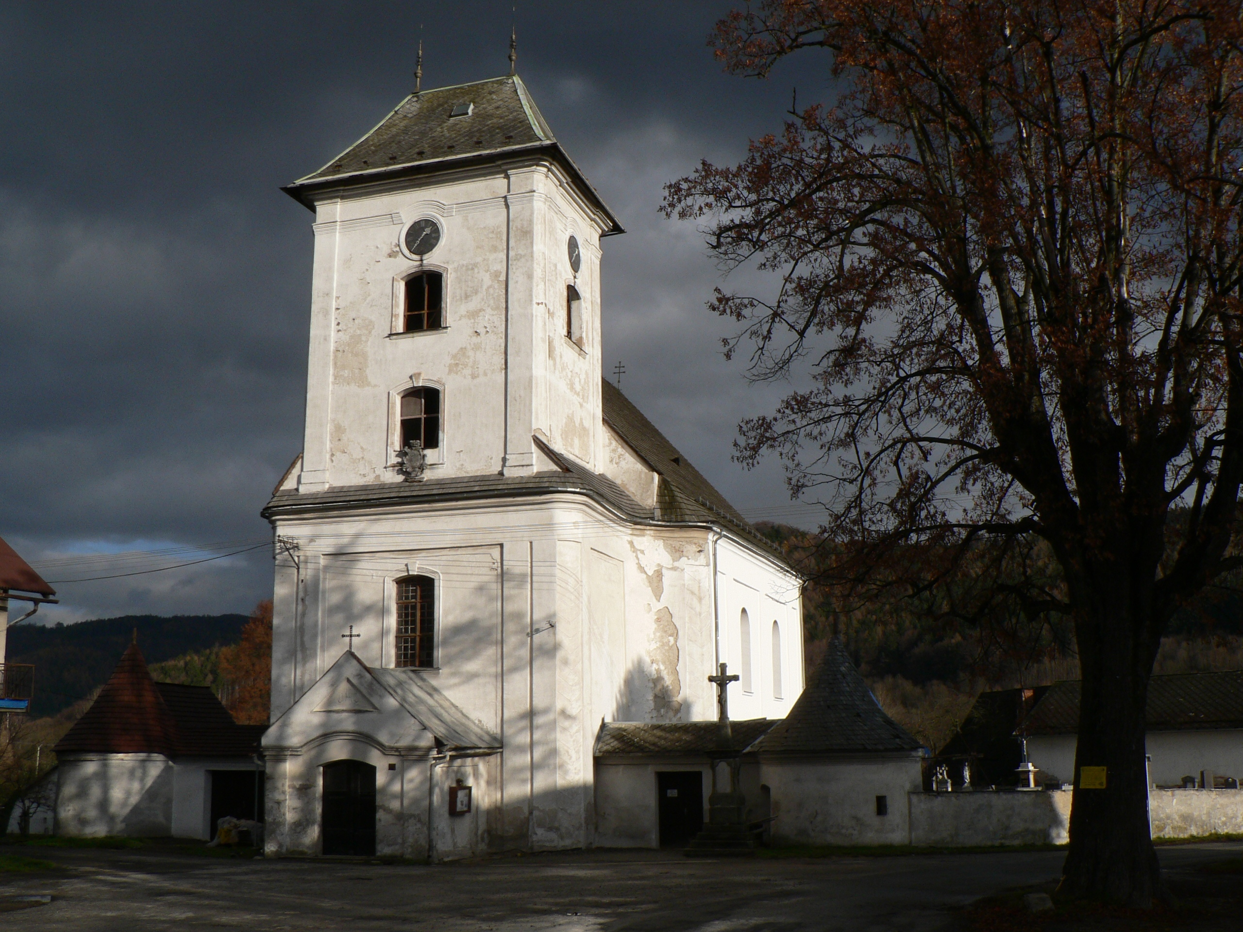 Kostel svatého Jana Křtitele (Raškov)